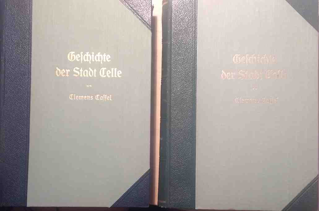 Geschichte der Stadt Celle mit besonderer Berücksichtigung des Geistes und Kulturlebens der Bewohner. (in zwei Bänden) W. Ströher, Celle 1930/1934.